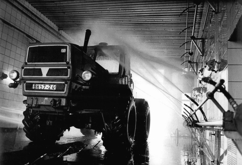 Crivitz, Waschanlage für Landmaschinen ADN-ZB Pätzold-6.10.82 Bez. Schwerin: In einer modernen Anlage auf dem Pflegestützpunkt Crivitz wird die Landtechnik gewaschen. 60 Strahldüsen werden elektronisch nach dem jeweiligen Maschinentyp in ihrem Waschablauf gesteuert. Die Anlage ist für alle landwirtschaftlichen Maschinen einsetzbar und garantiert eine optimale Pflege. - siehe auch ADN-Meldung